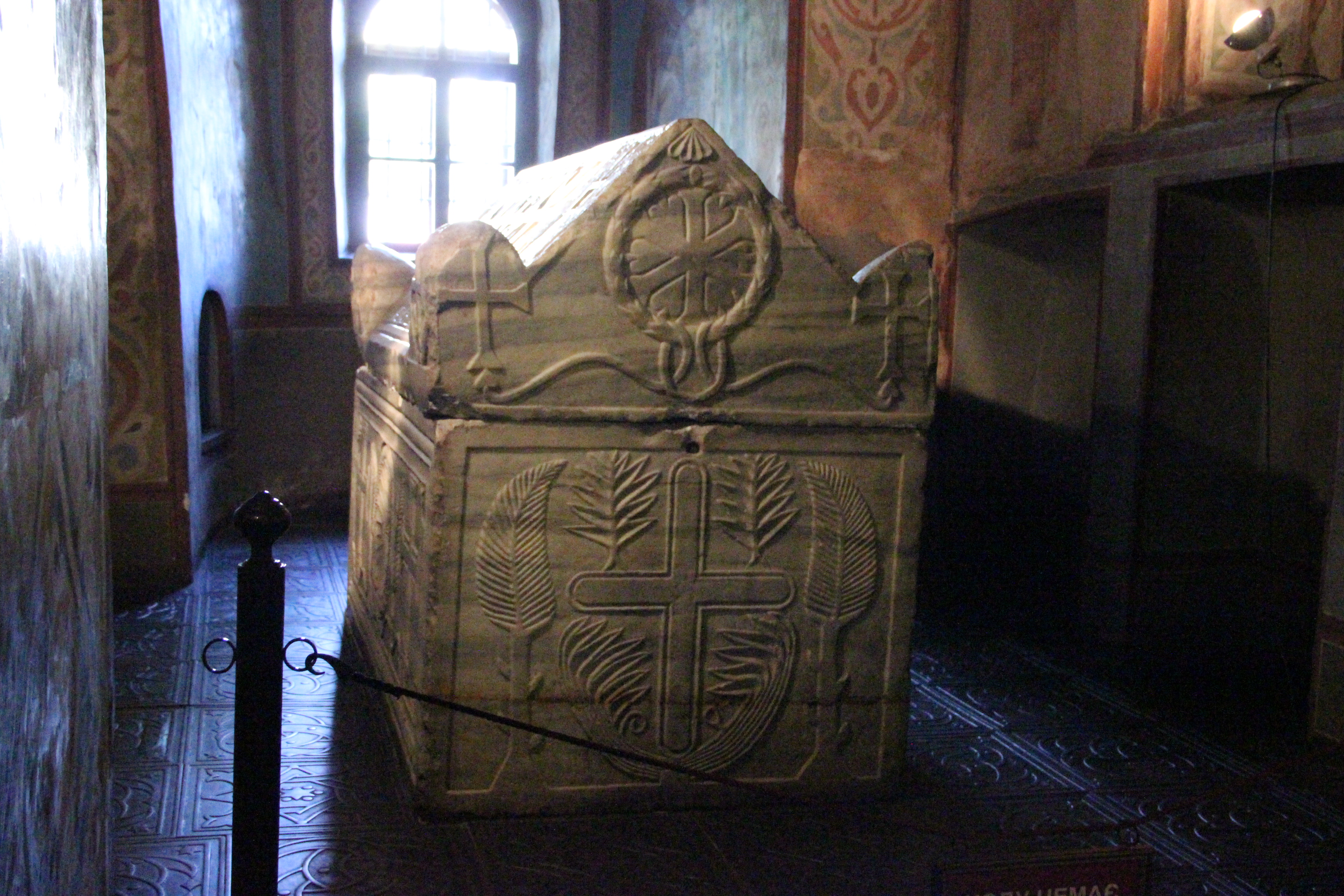 Домовина князя Ярослава Мудрого у Софіївському соборі.